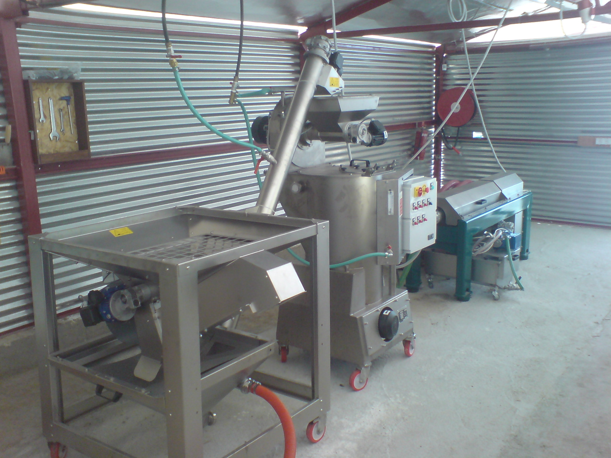 בית בד מודרני במושב אשתאול